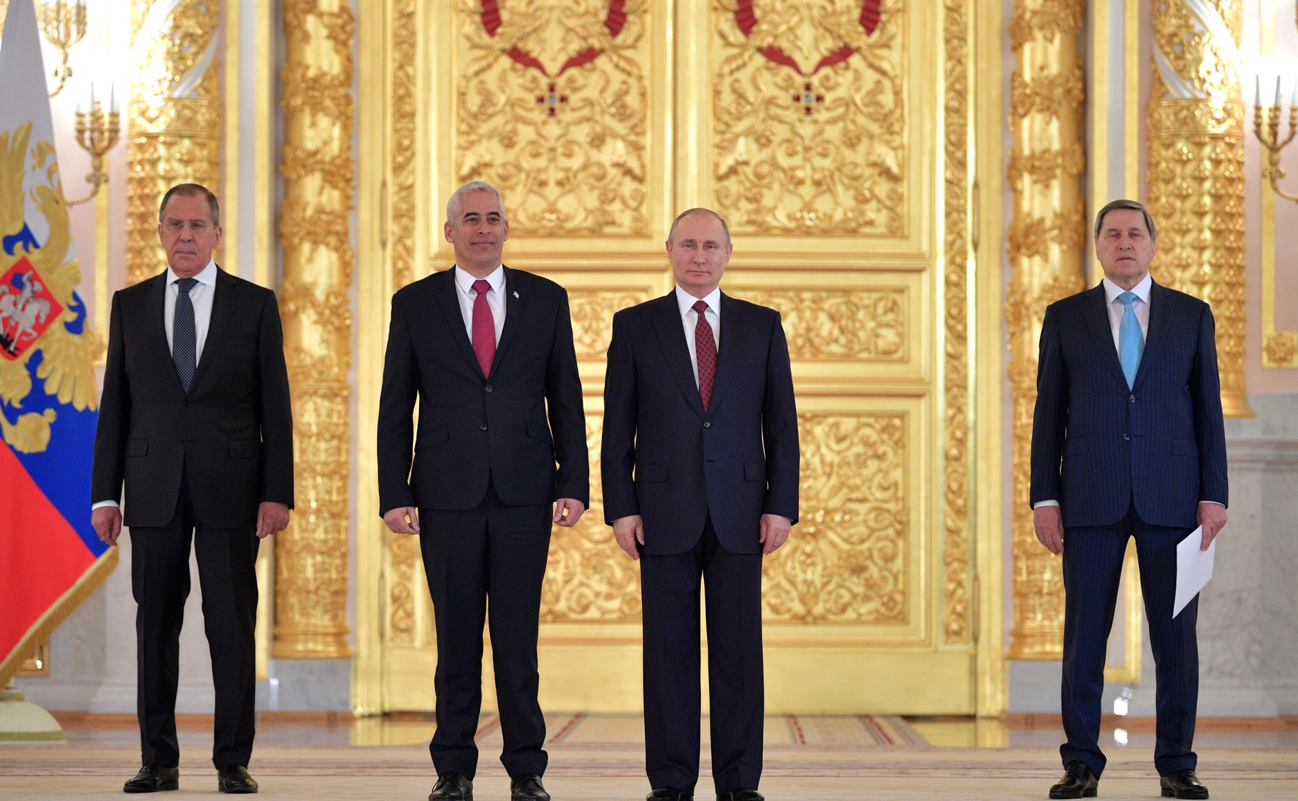 В Александровском зале Большого Кремлёвского дворца Владимир Путин принял верительные грамоты у послов ряда иностранных государств. На церемонии вручения верительных грамот. С Чрезвычайным и Полномочным Послом Республики Куба в Российской Федерации Херардо Пеньяльвером Порталем.